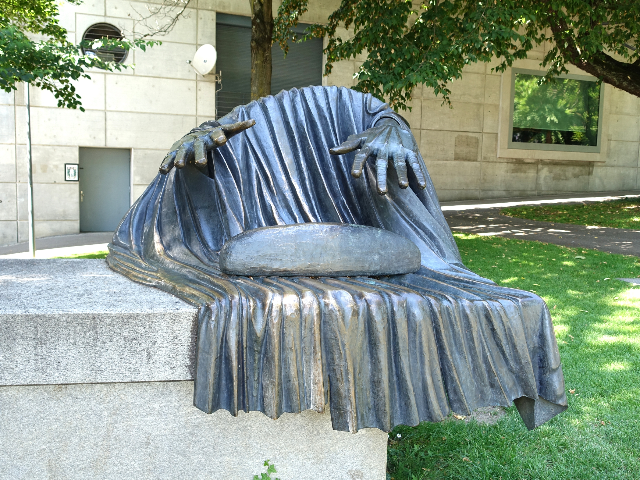 Metallplastik. Brot teilen von Valery Heussler-Maler (1920–2007) am Theodorsgraben-Anlage, Basel